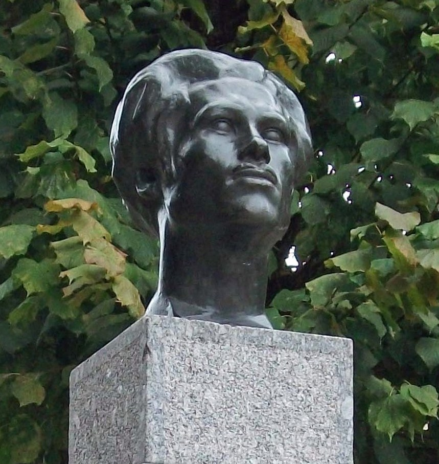 Buste de Antral dans un parc de Châlons.